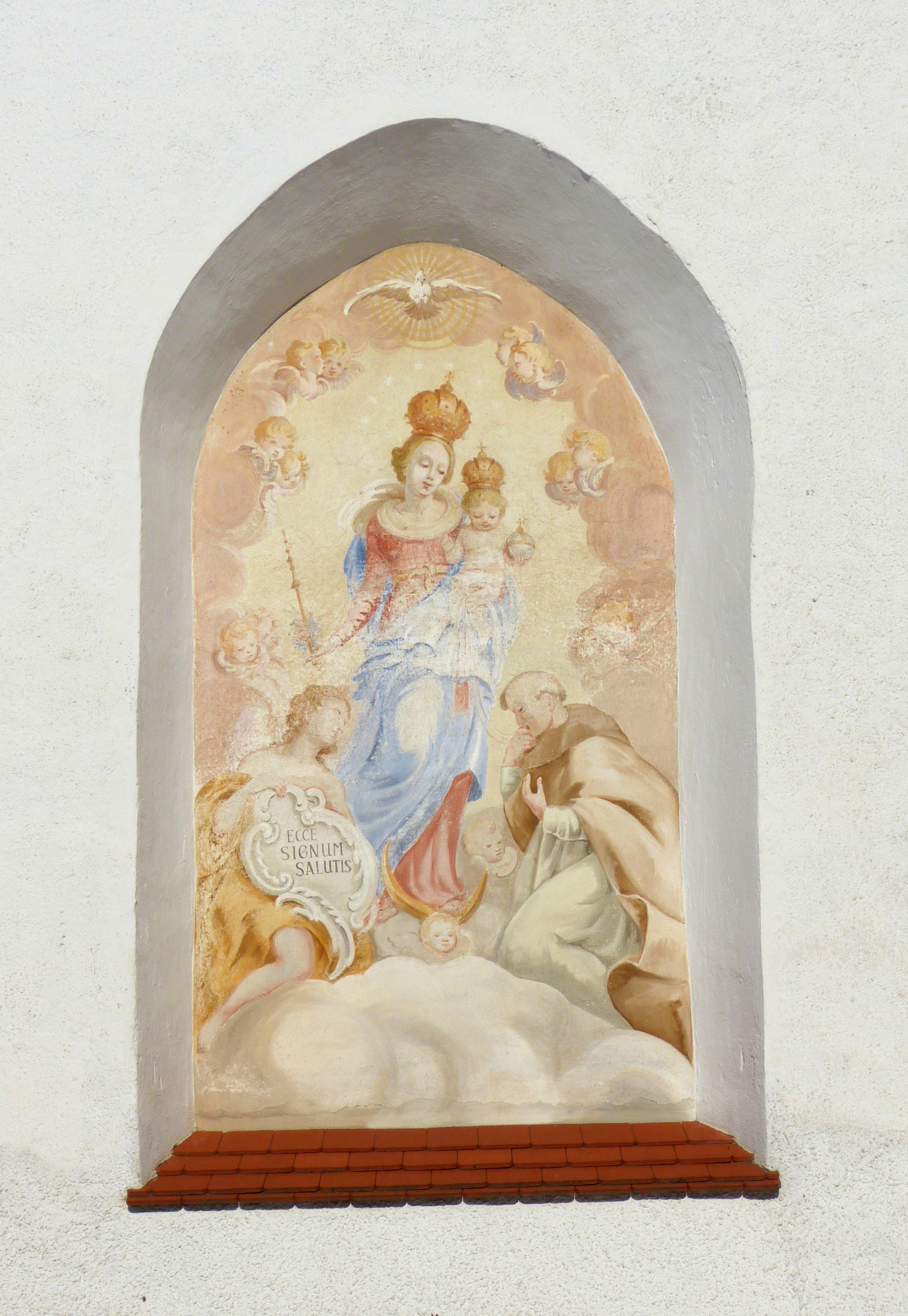 St. Simon und Judas Thaddäus, Holzgünz, Landkreis Unterallgäu, Bayern